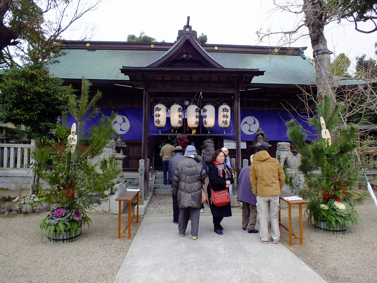 御坂神社拝殿